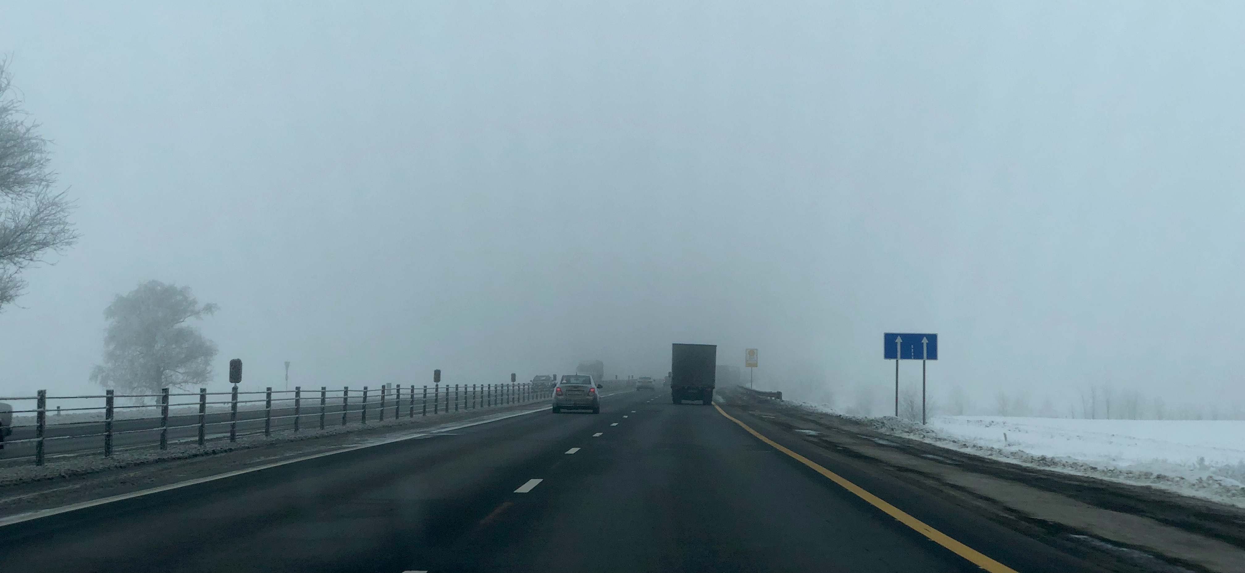 М4 Дон Октябрьский район